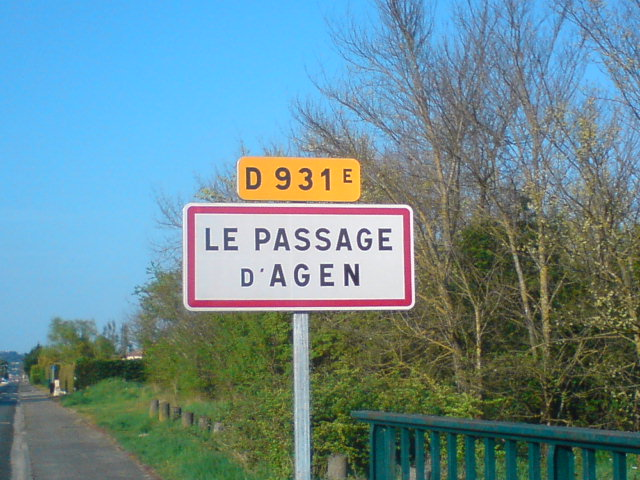 panneau entrée de ville